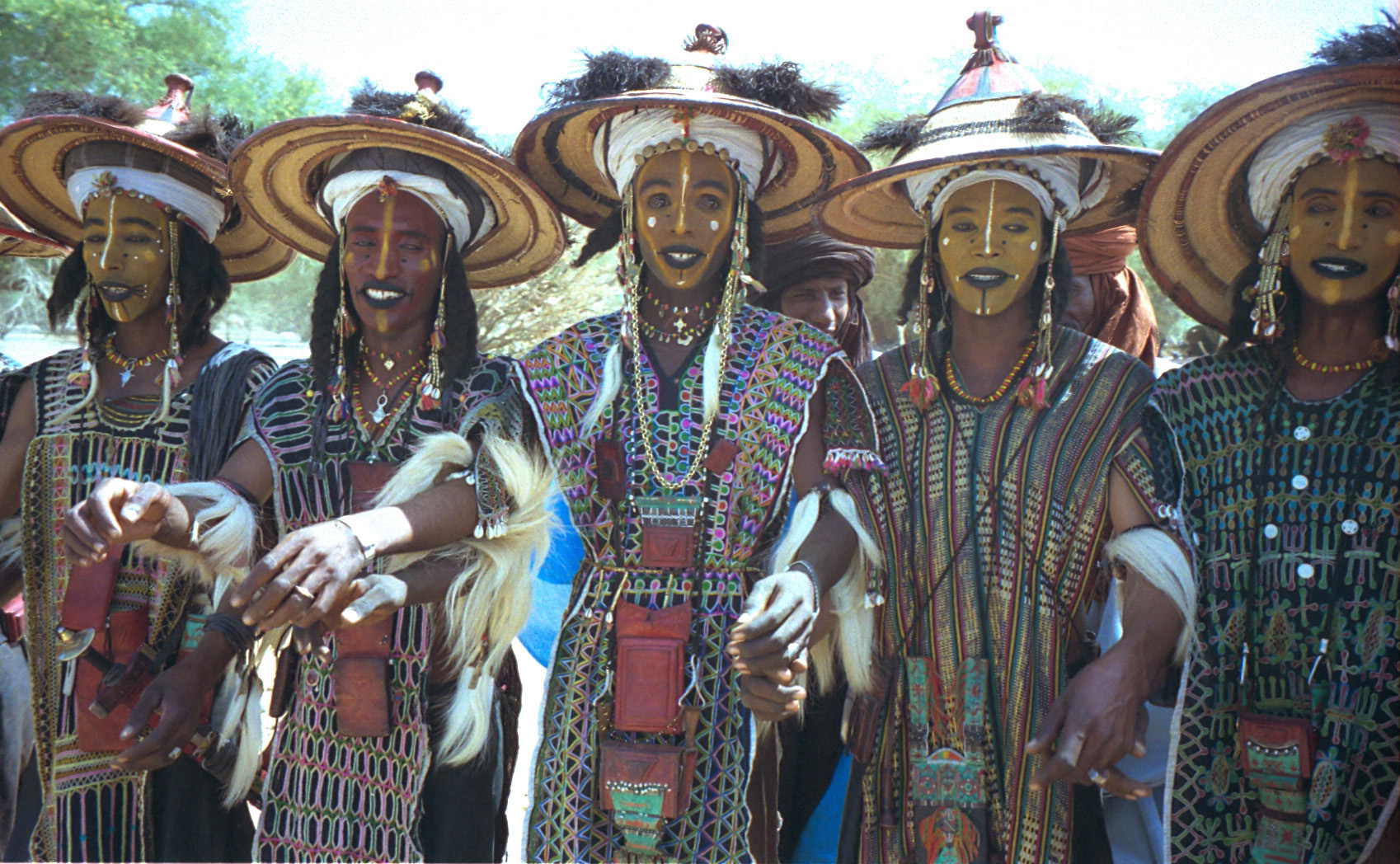 Wodaabe performing a Yaake dance. Niger 1997.1997 #276-18A Yaake demonstration